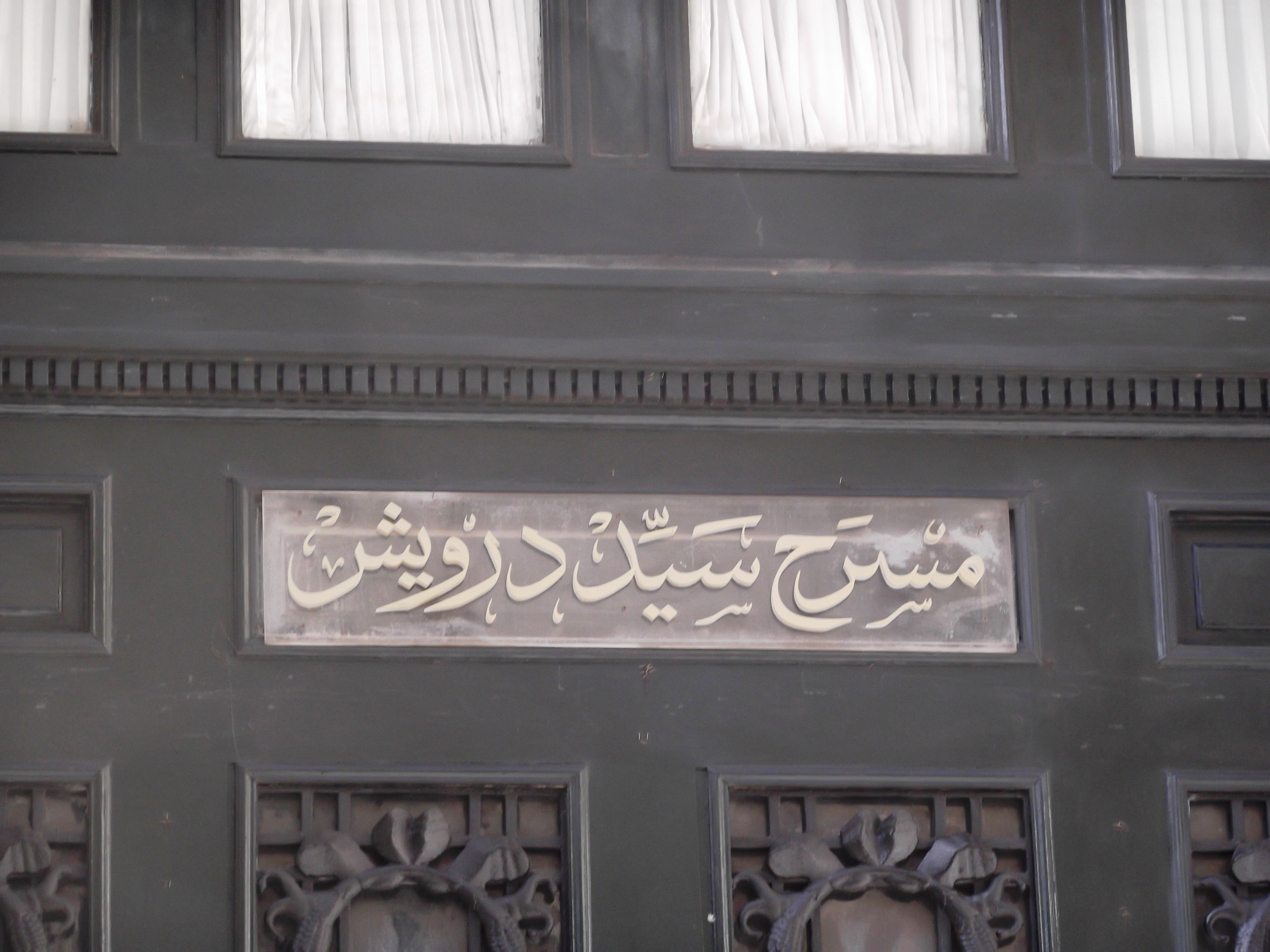 مسرح سيد درويش بدار أوبرا الإسكندرية، مصر.